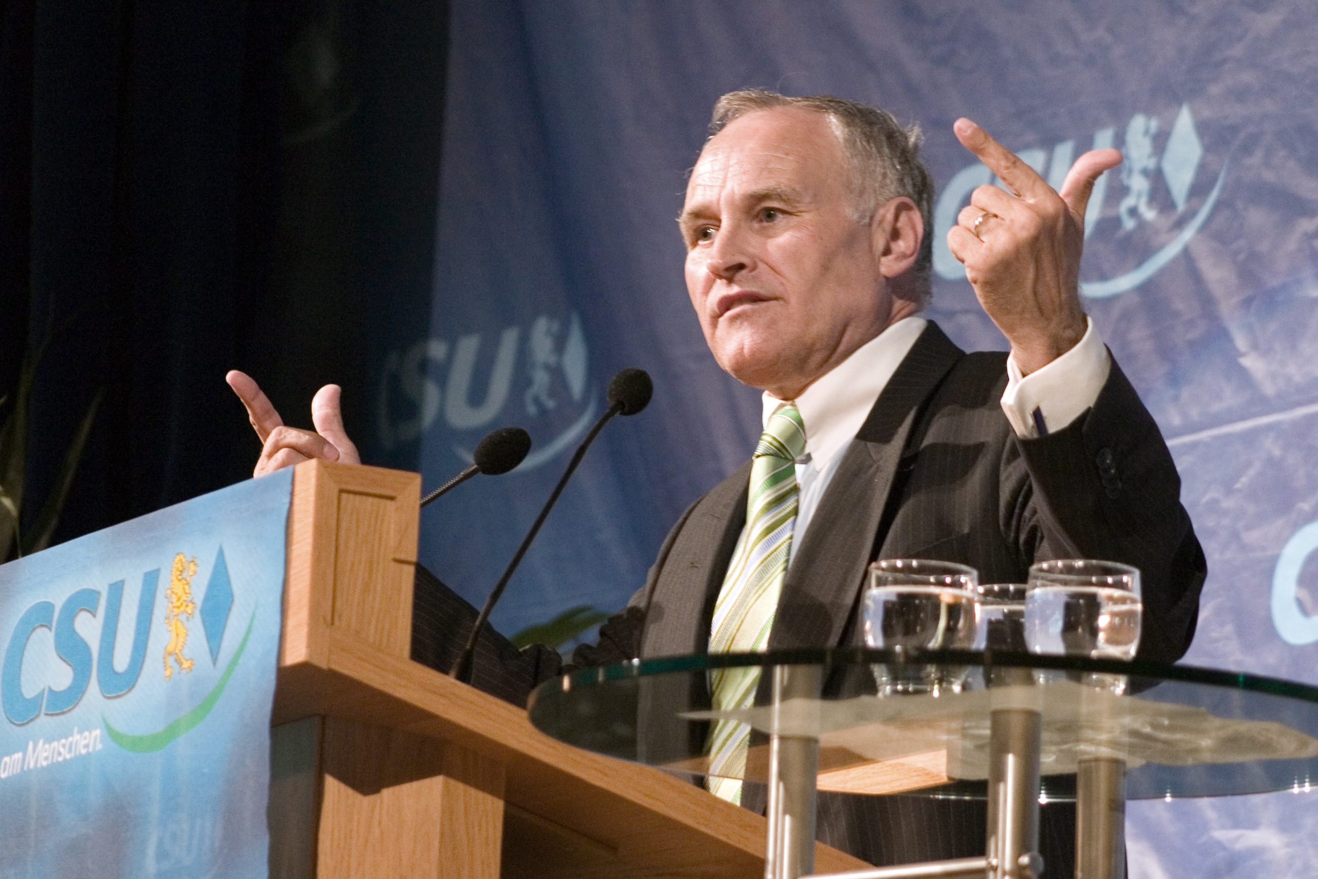 Erwin Huber, CSU-Politiker, bayerischer Staatsminister